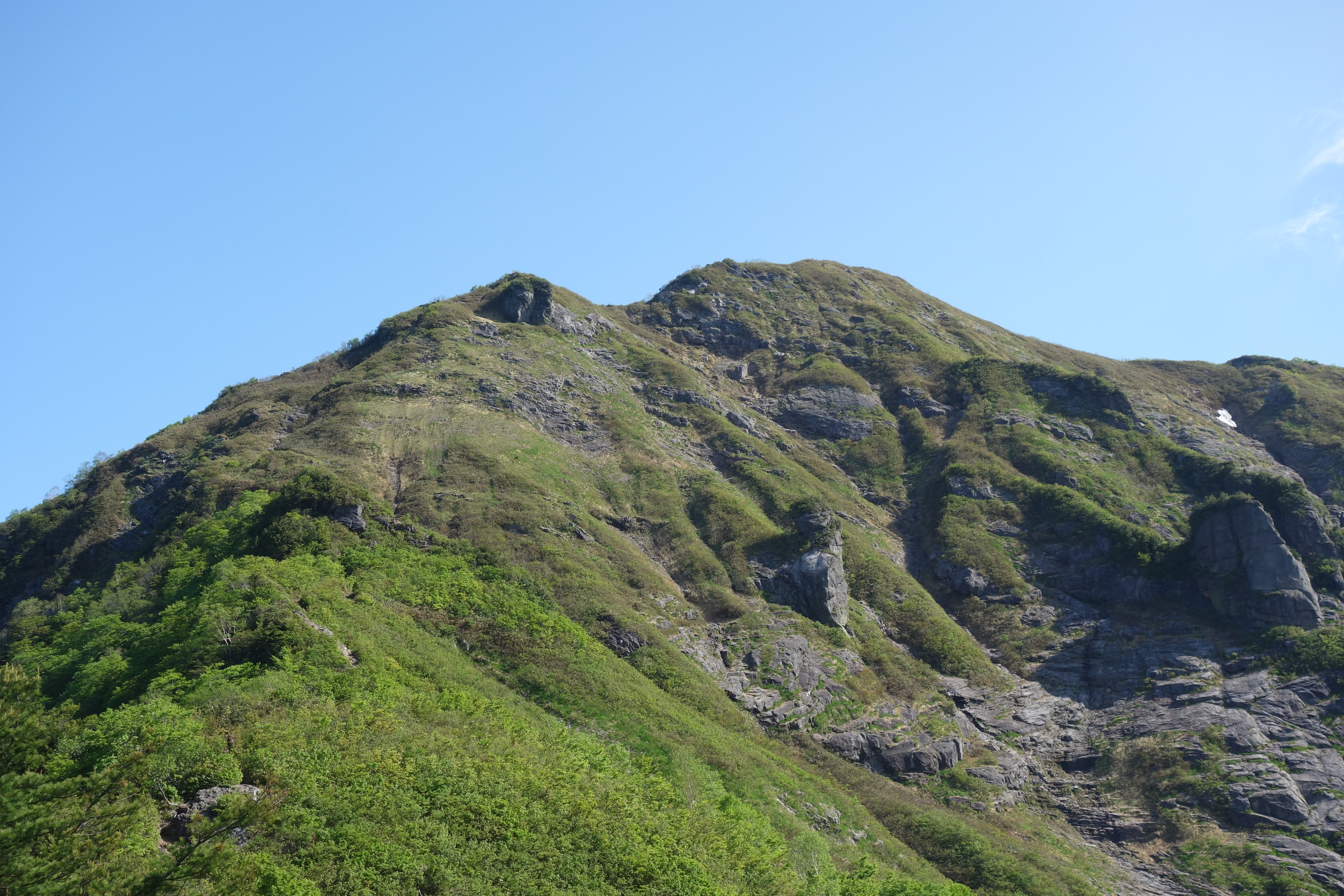 松ノ木沢ノ頭から見た白毛門